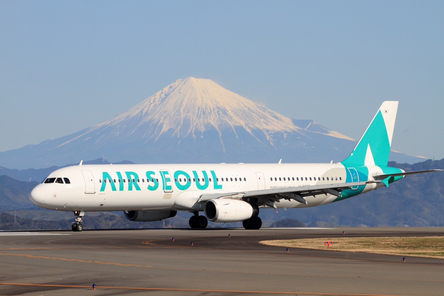 시즈오카 공항 전경 및 후지산